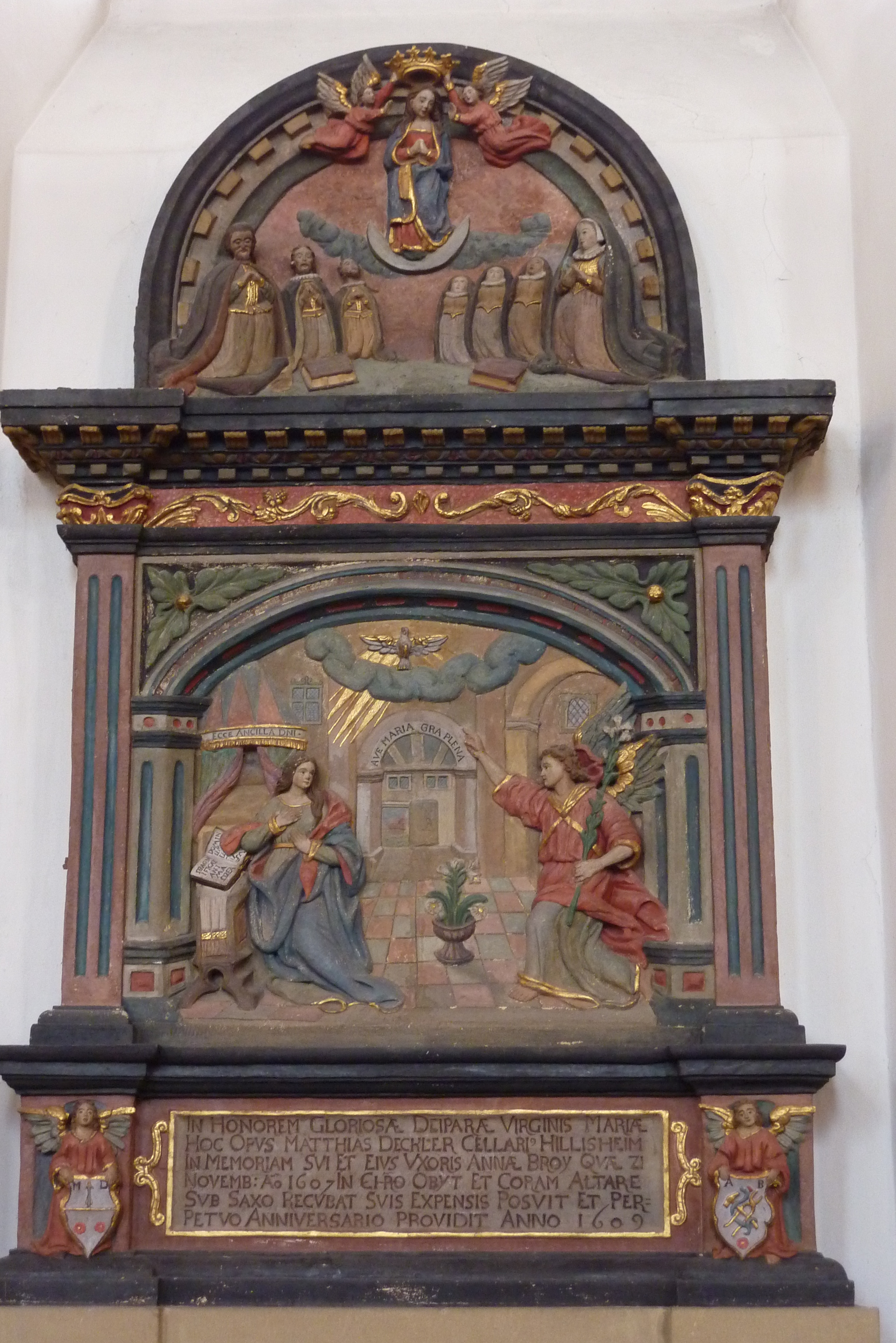 Katholische Pfarrkirche St. Martin in Hillesheim, Seitenaltar, Darstellung: Verkündigung